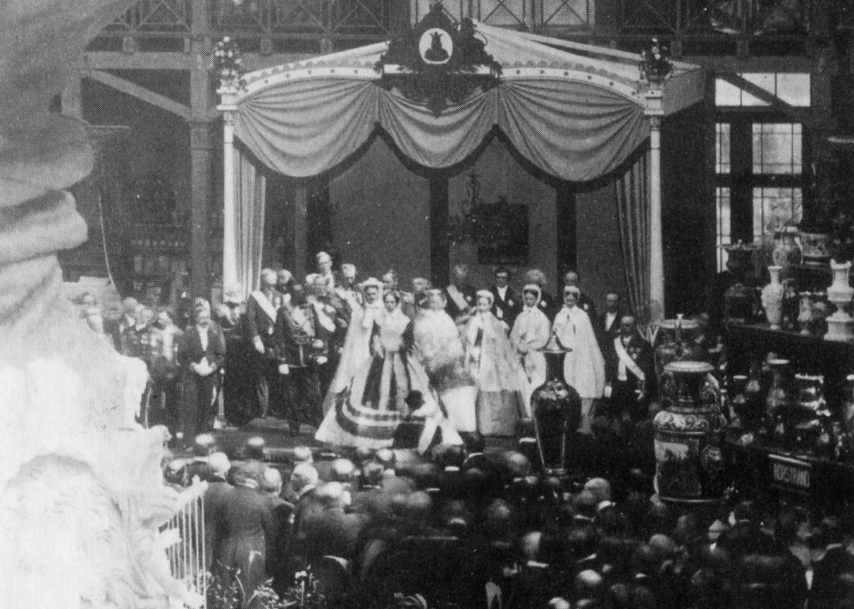 Stockholmsutställningen 1866, invigning av drottning Lovisa. Bilden räknas som Sveriges första reportagebild.